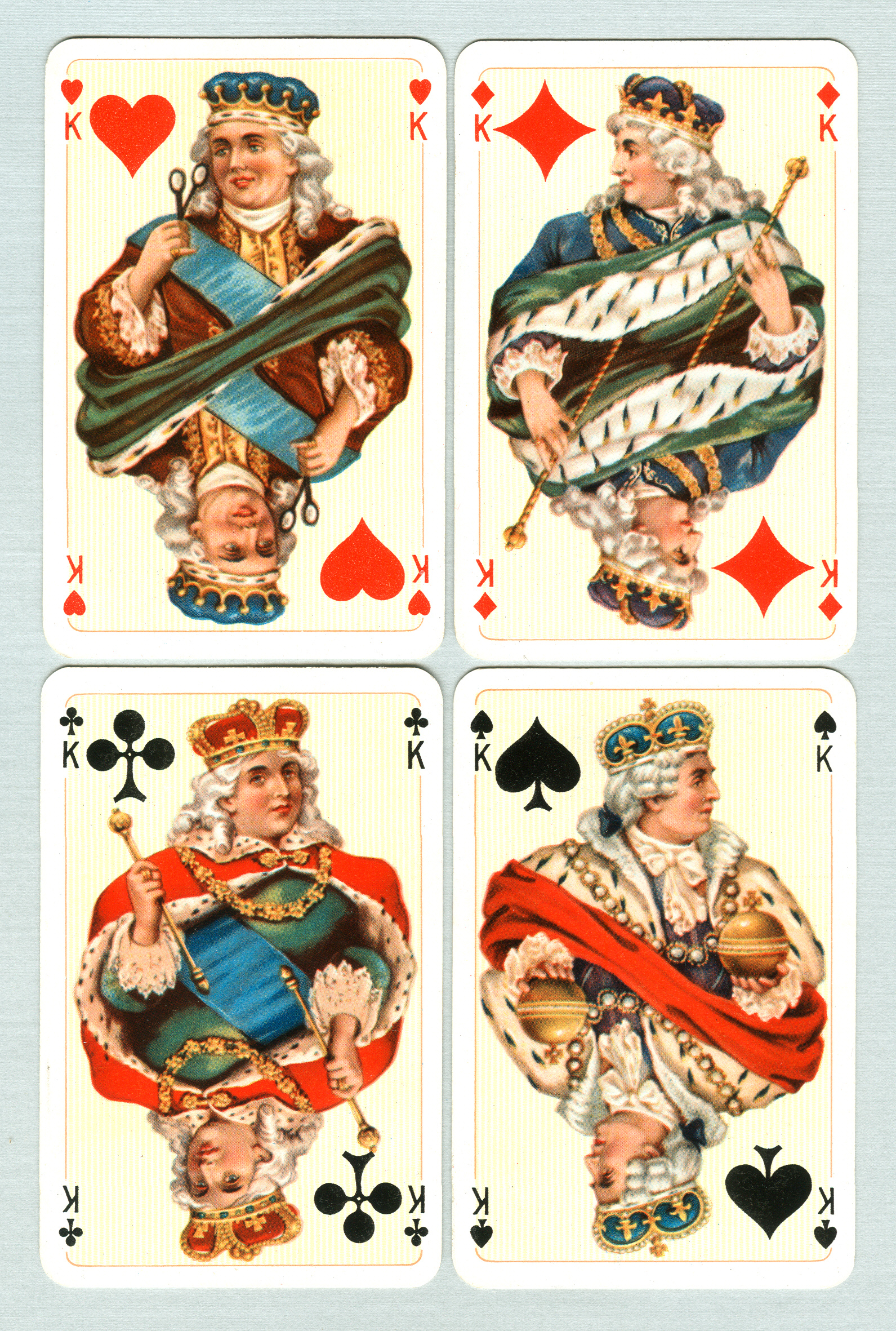 Deutschland 1955, Könige aus einem Skatspiel.